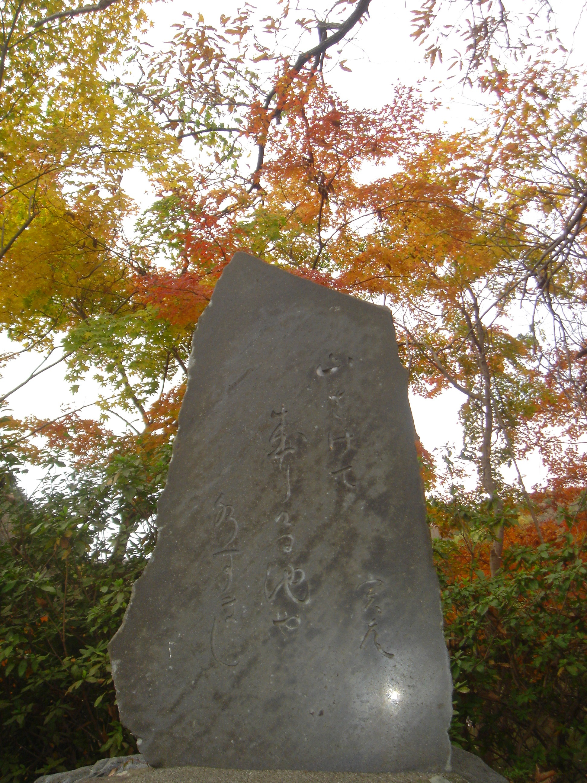 震生湖畔の寺田寅彦句碑